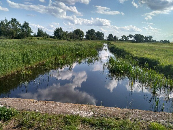 Прошчыцкі мост